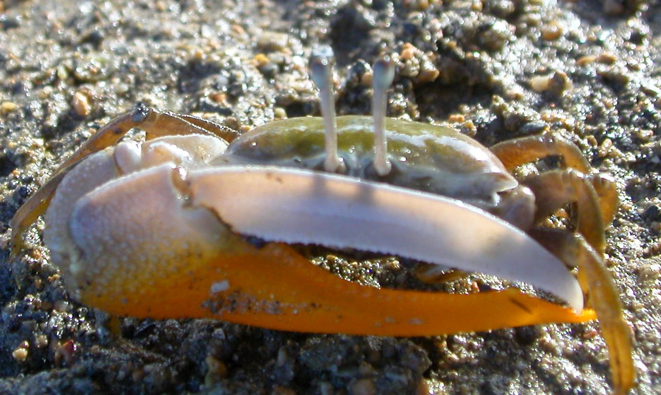 Uca dussumieri